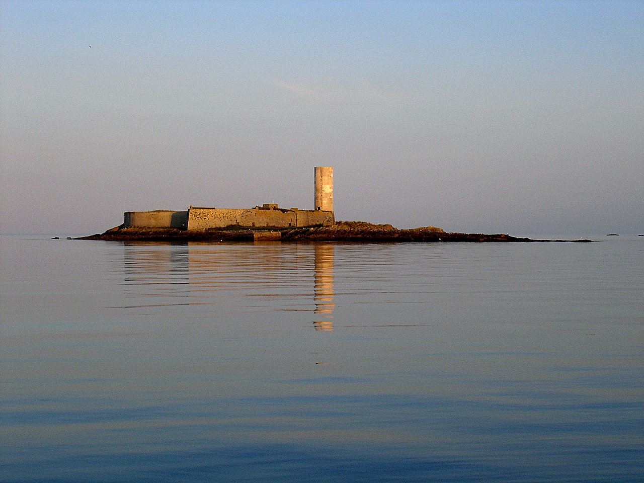 Fort Cigogne en soirée